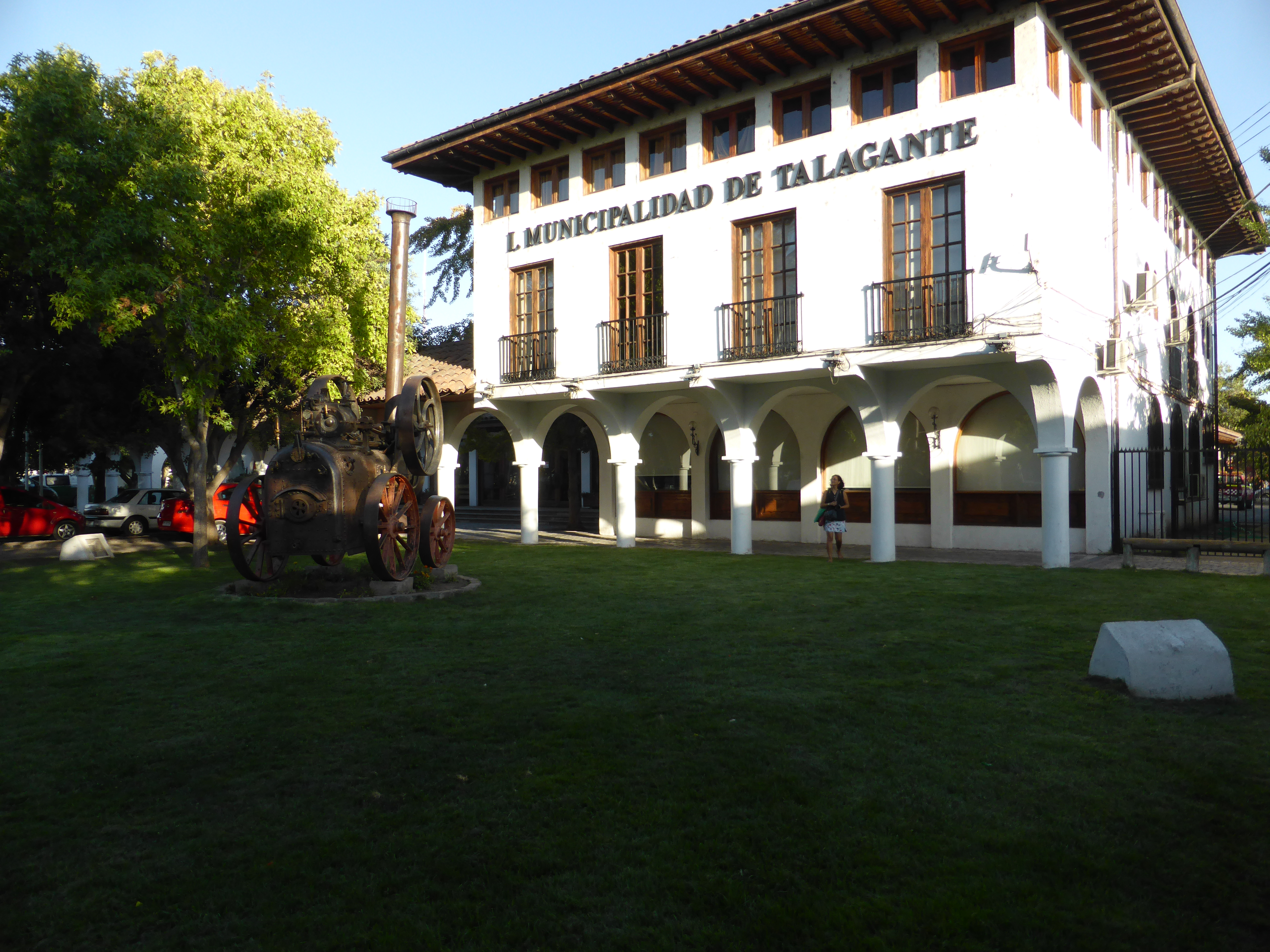 Edificio sede de la "Ilustre Municipalidad de Talagante". A la izquierda, en el pasto, se encuentra un antiguo locomóvil fabricado en Inglaterra por "Marshall Sons & Co.", con el número 39821. (Un locomóvil es un tipo de maquinaria agrícola, usada a comienzos del siglo XX).